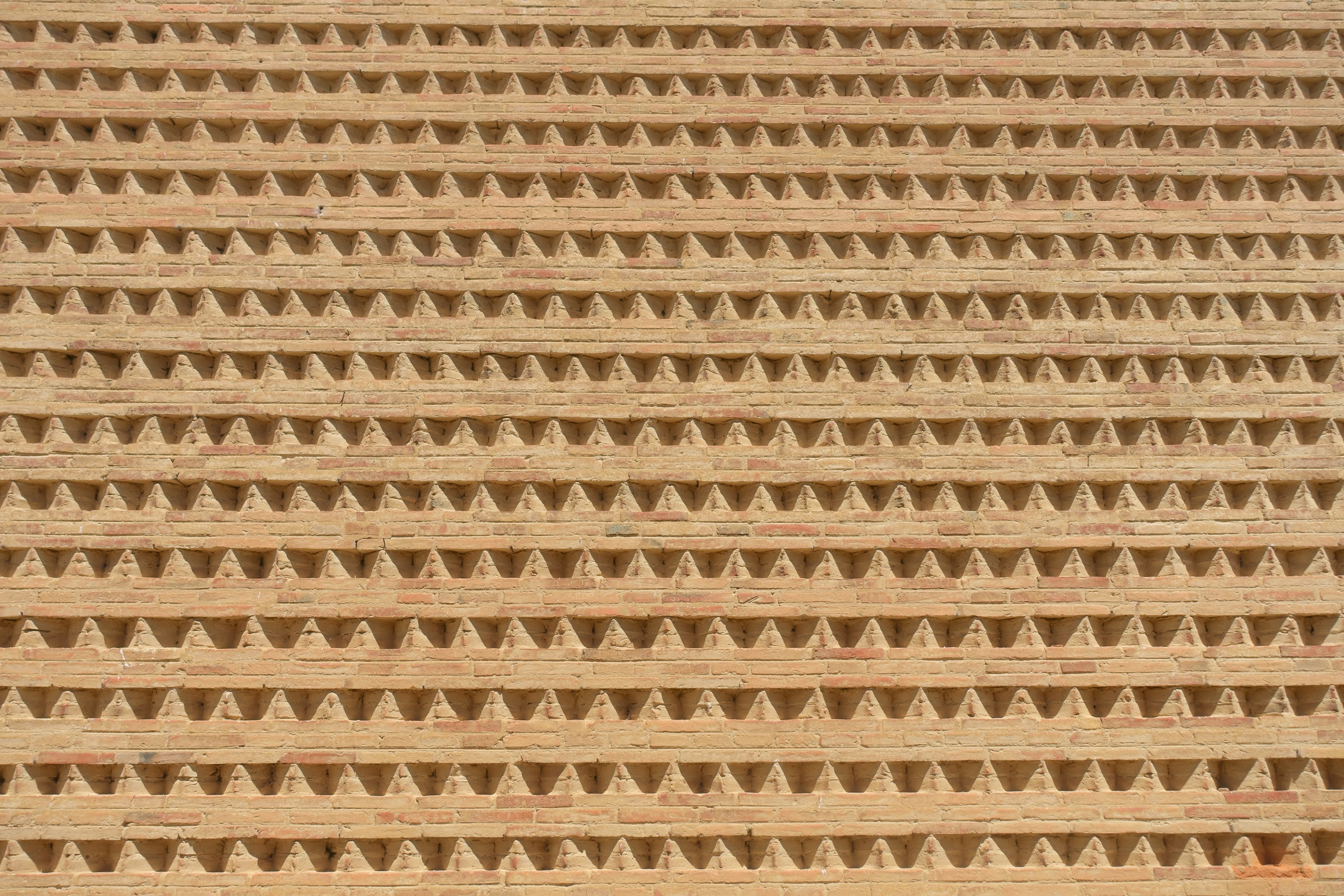 Iglesia de la Asunción de Nuestra Señora, en Villamayor de Campos (Zamora, España).